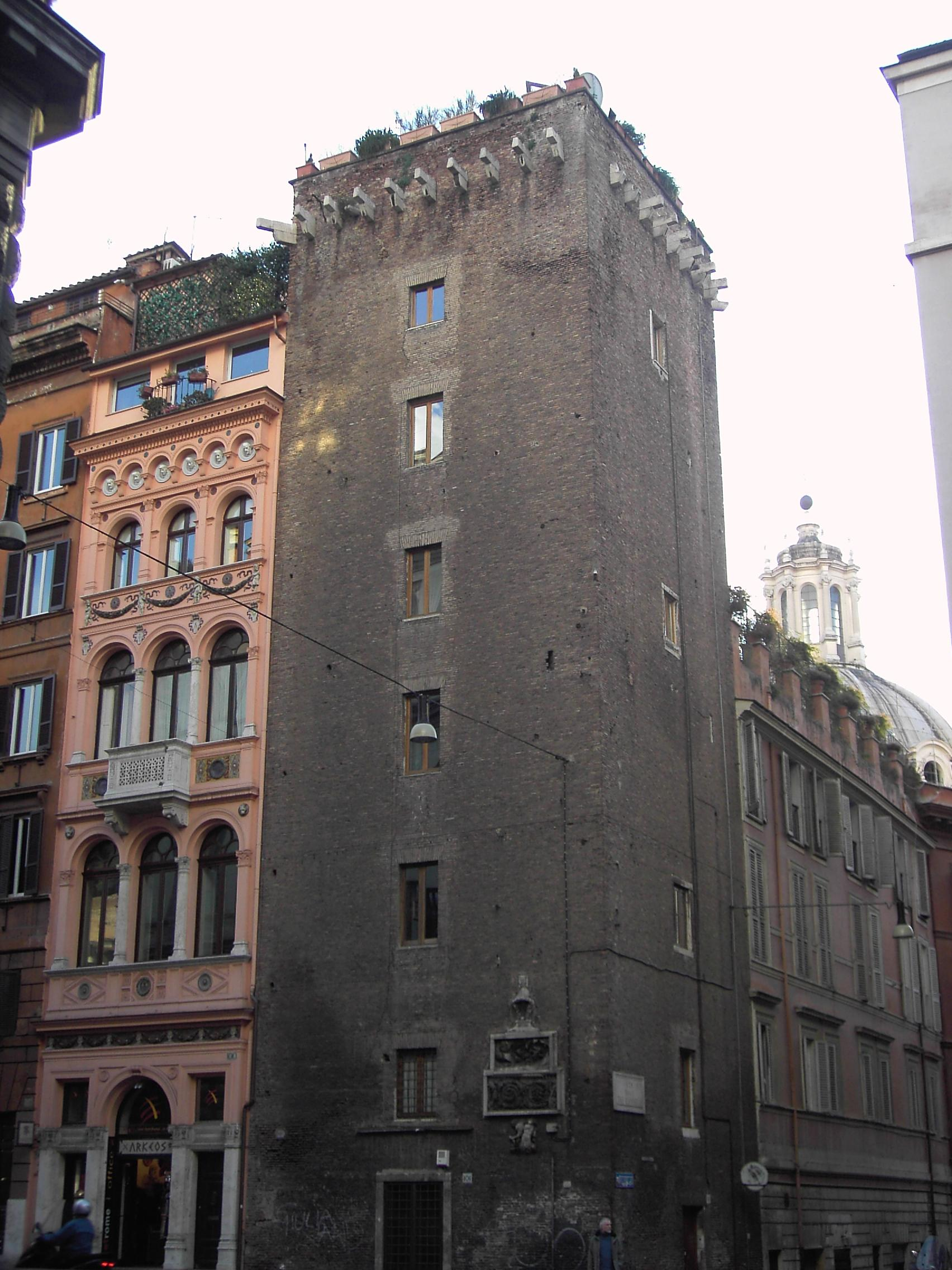 Roma, Torre dei Colonnesi a via delle Tre Cannelle (Trevi)